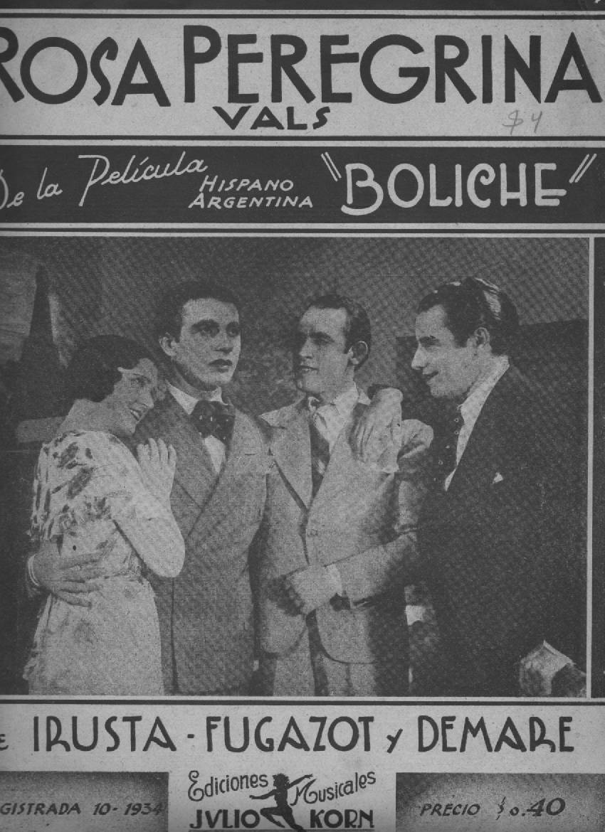 fotografía de Lucio Demare en la película "Boliche"